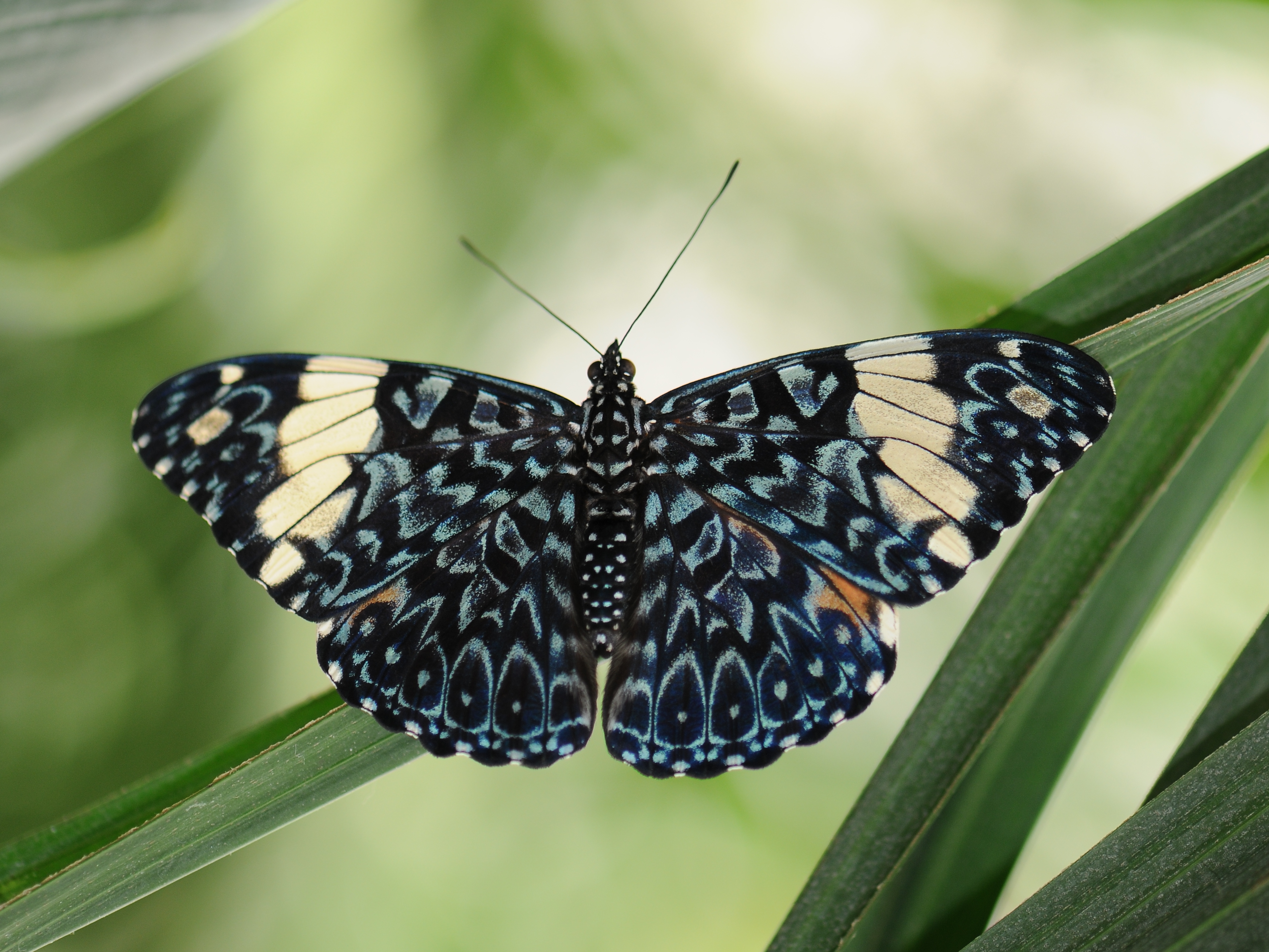 Ein Blauer Mosaikfalter Hamadryas amphinome. *** Gesehen im Schmetterlingshaus auf der Insel Mainau.